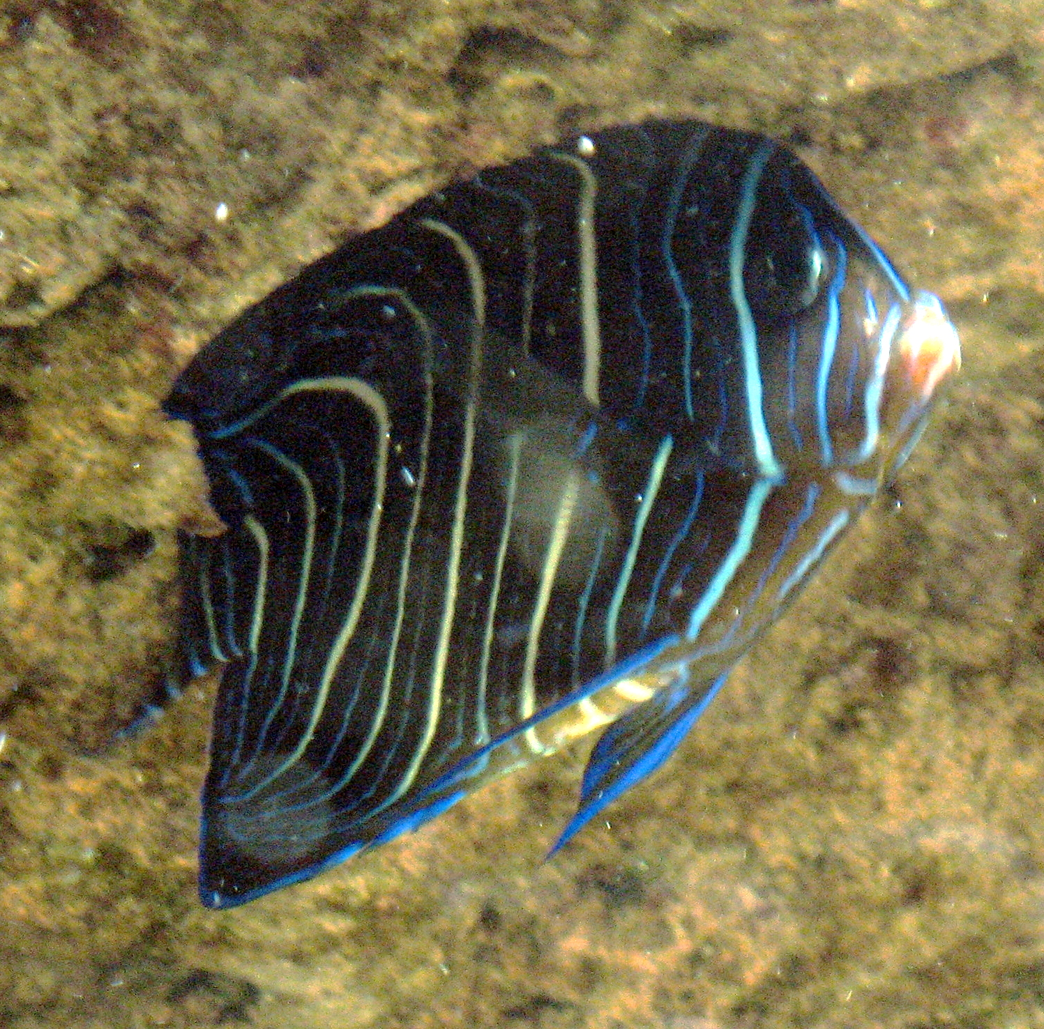 Young Pomacanthus imperator or Pomacanthus semicirculatus in Aquarium Cinéaqua Map: 48° 51' 44" N 2° 17' 27" E